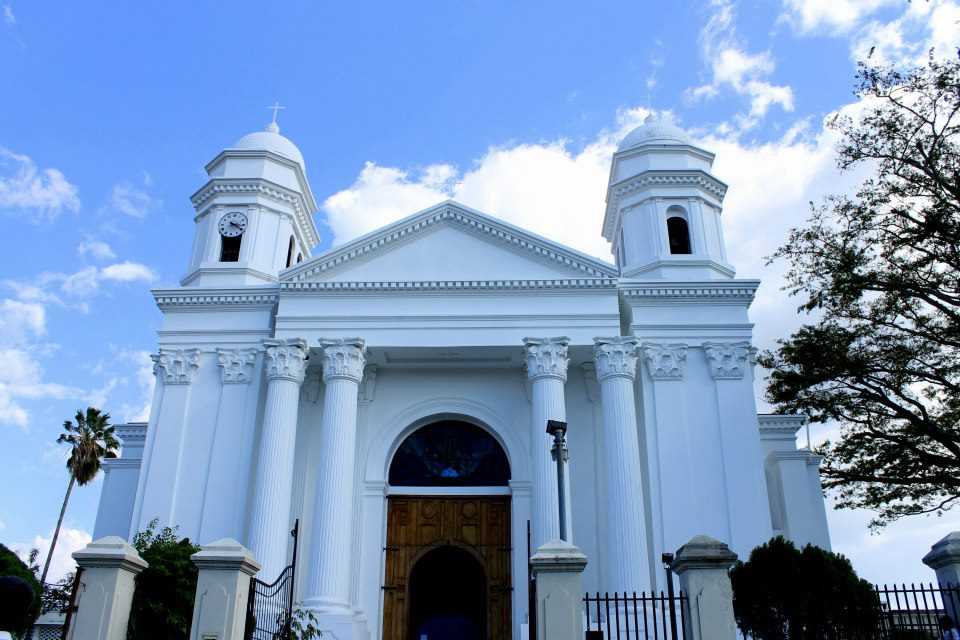 Fachada principal de la Catedral de Sonsonate.